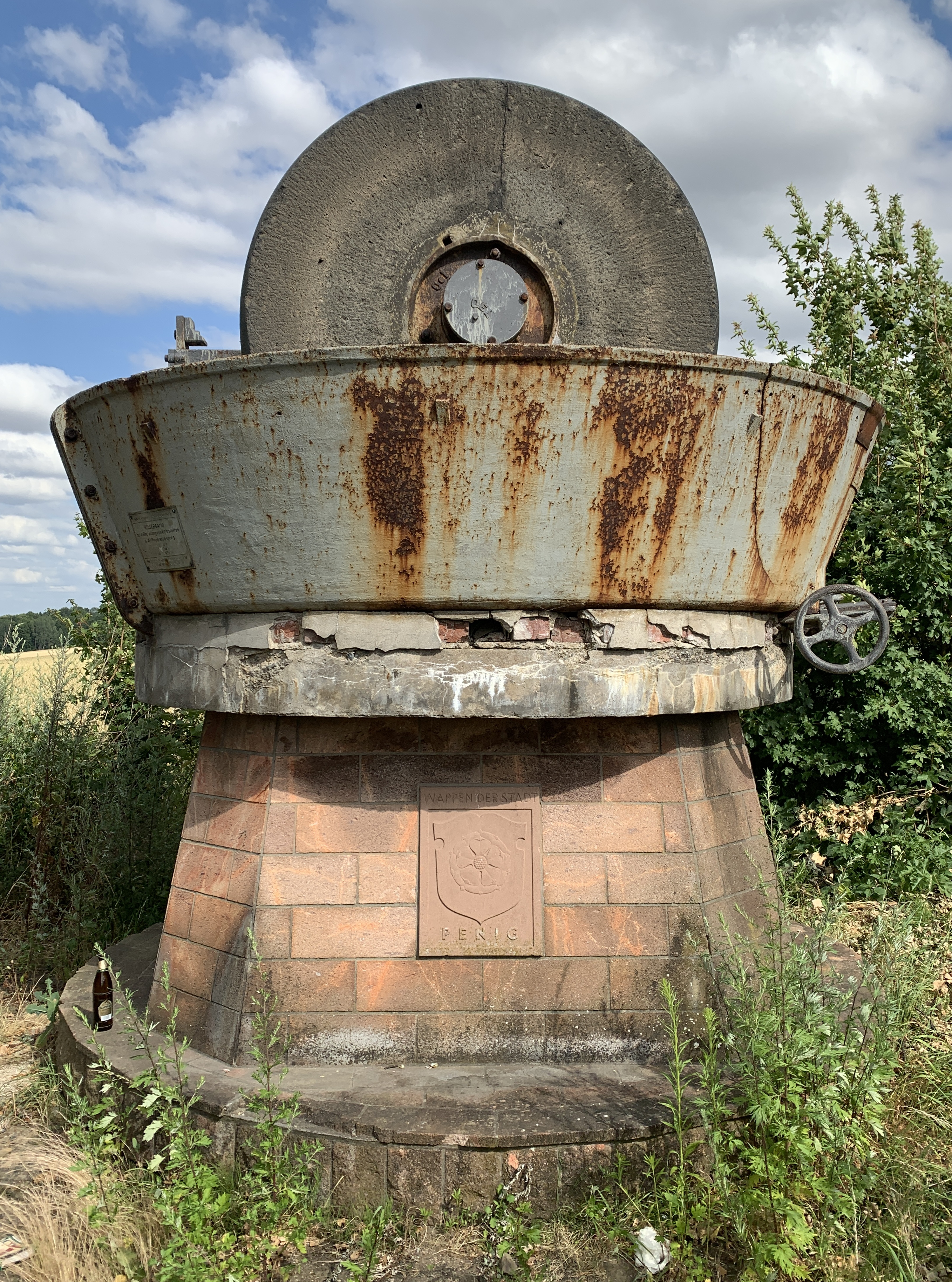 historischer Kollergang am Ortseingang von Penig, Technisches Denkmal